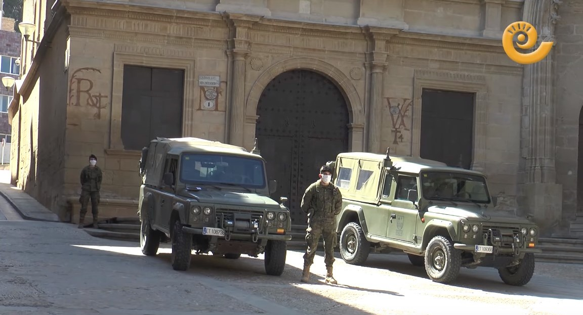 Dos soldados del ejército español en Alcañiz durante el estado de alarma (27 de marzo de 2020)